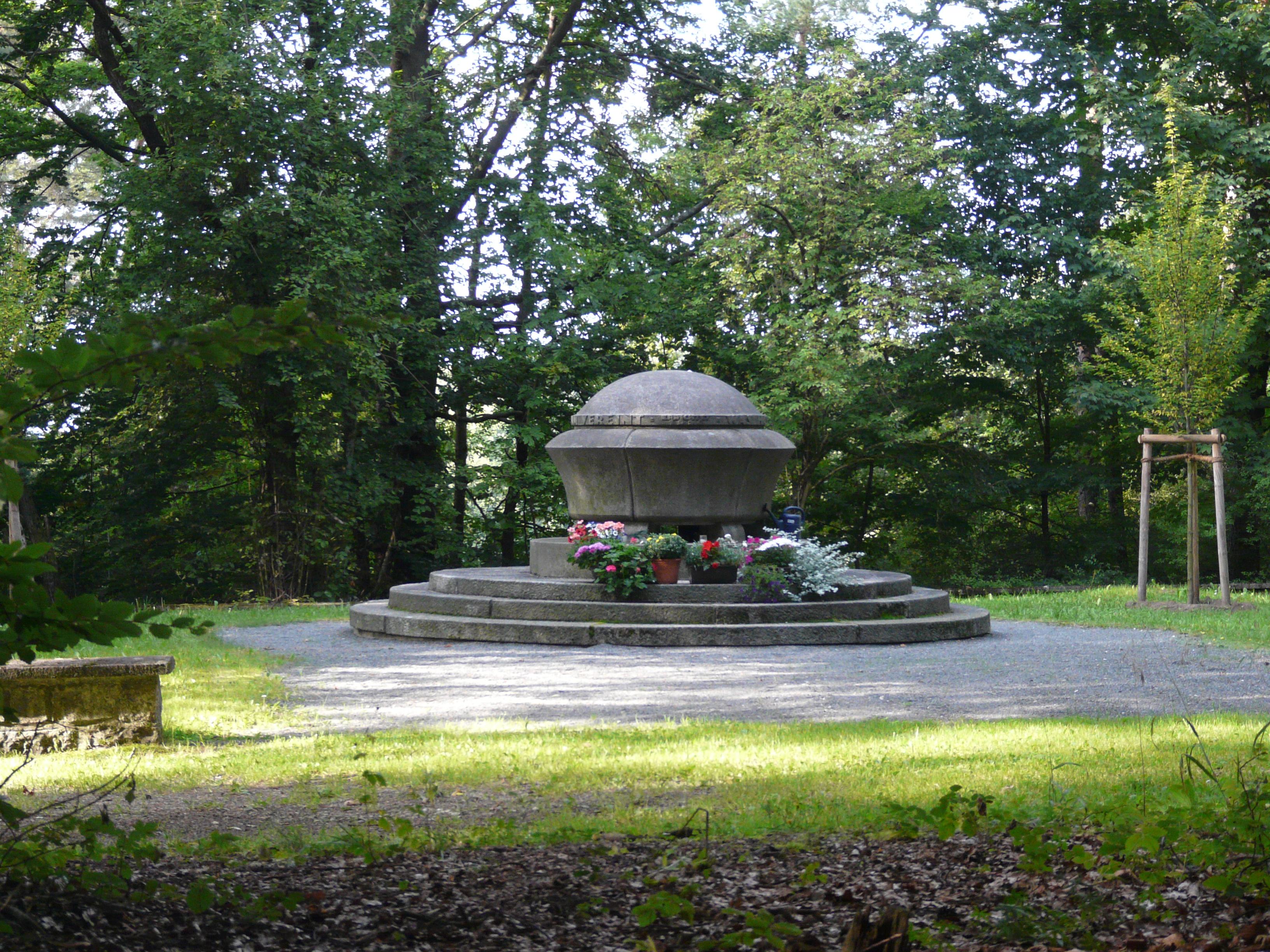 Nahe dem Ort Schupf gelegenes Mahnmal der Opfer des Konzentrationslagers Hersbruck.